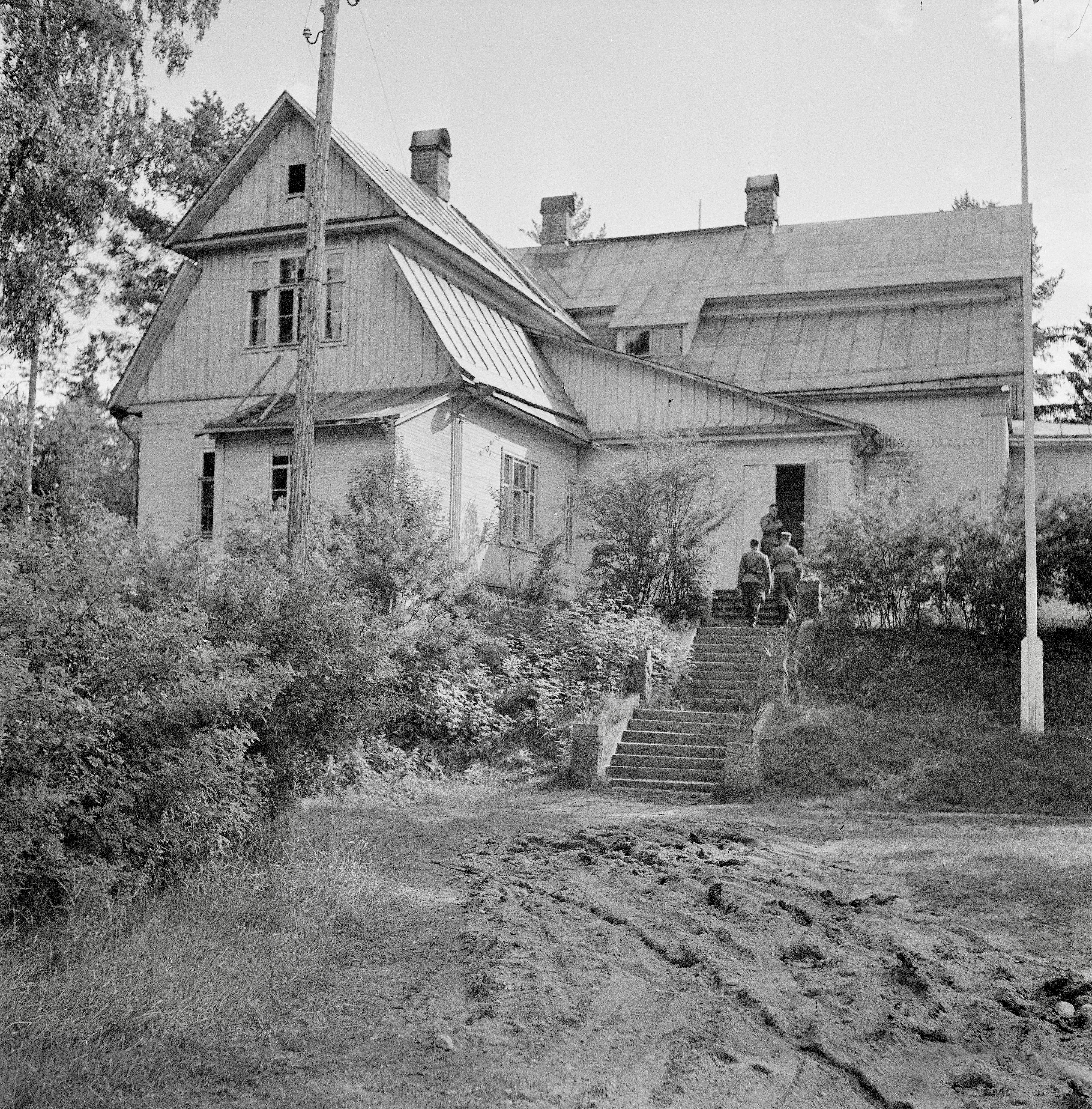 Дача Коренчевского Дача на участке Ридингера, по Кяхёнен восточнее участка №40 ,где позже разместился санаторий «Репино». В 1941-44 гг. - Командный пункт финского 27-го пехотного полка 18-й дивизии